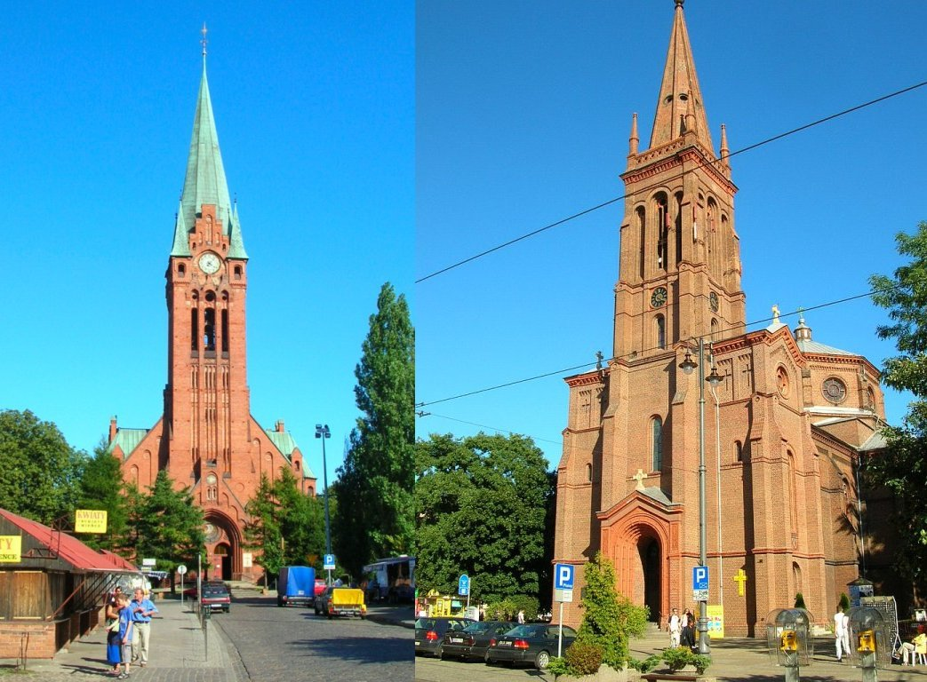 Kościoły Bydgoszczy: jezuitów (św. Andrzeja Boboli) i św. Piotra i Pawła